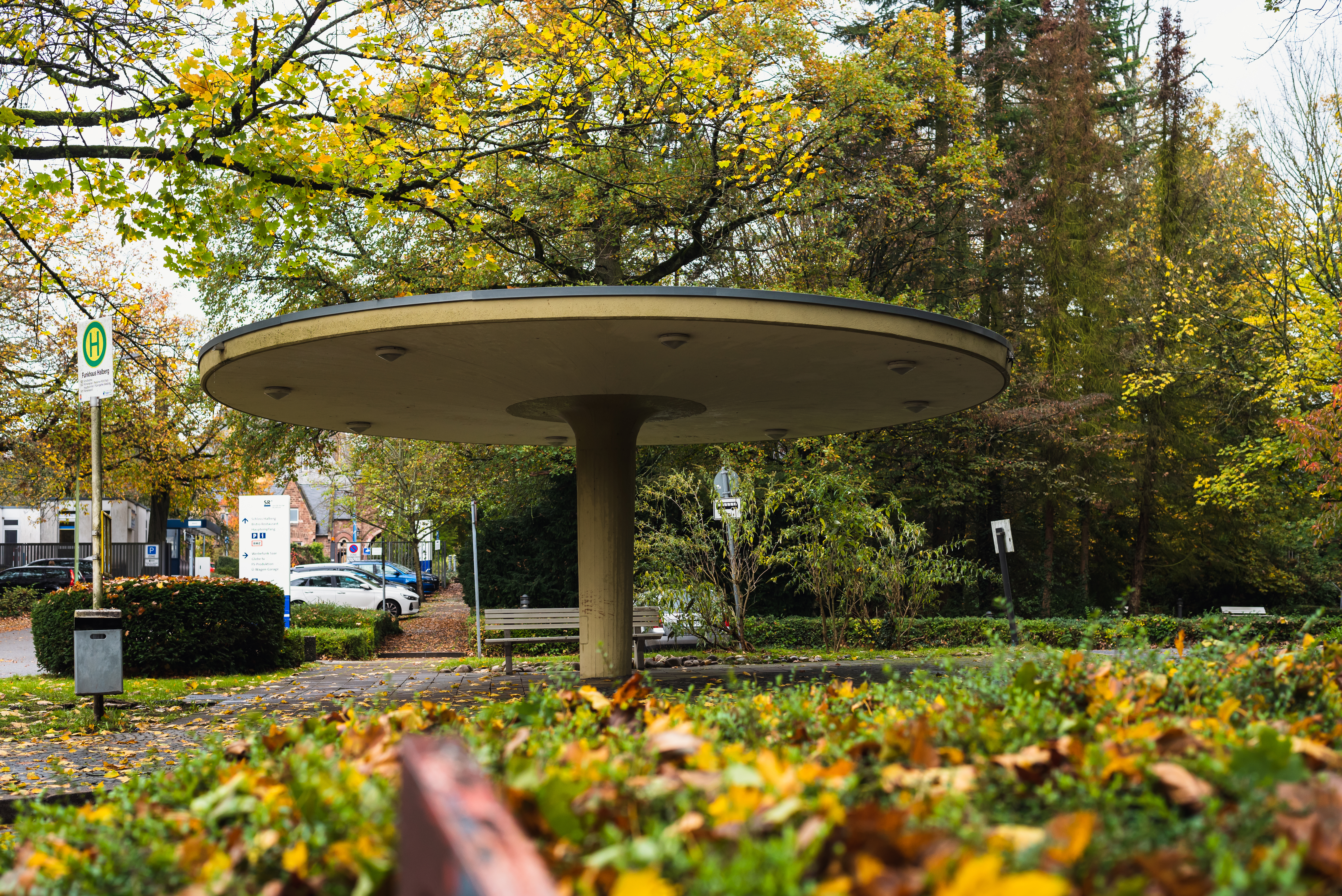 Der Buspilz im Herbst.